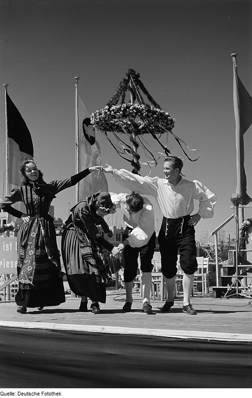 Original image description from the Deutsche Fotothek Aufführung eines Volkstanzes